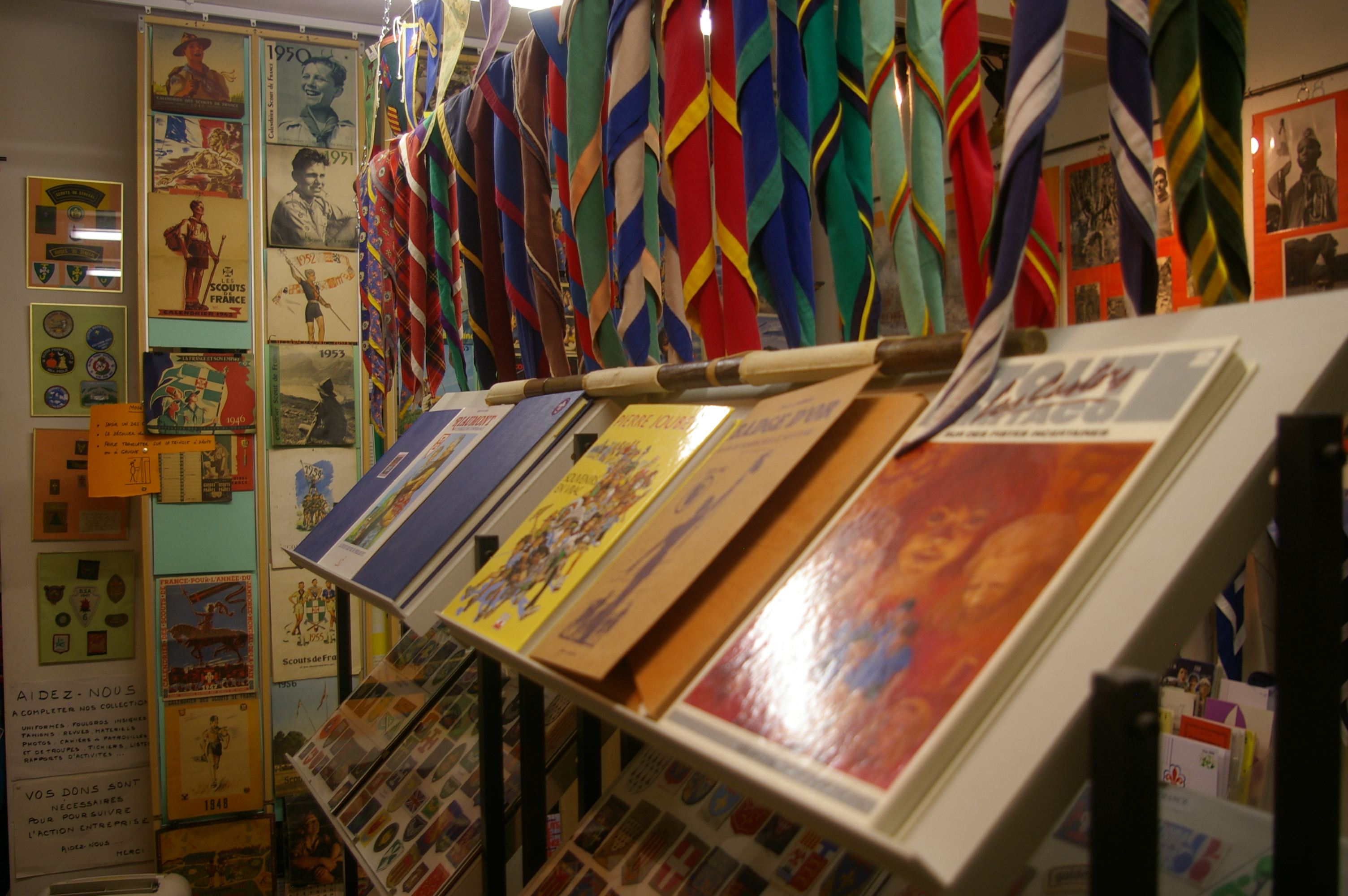 vue d'une des salles du musée scout Baden-Powell à Sisteron